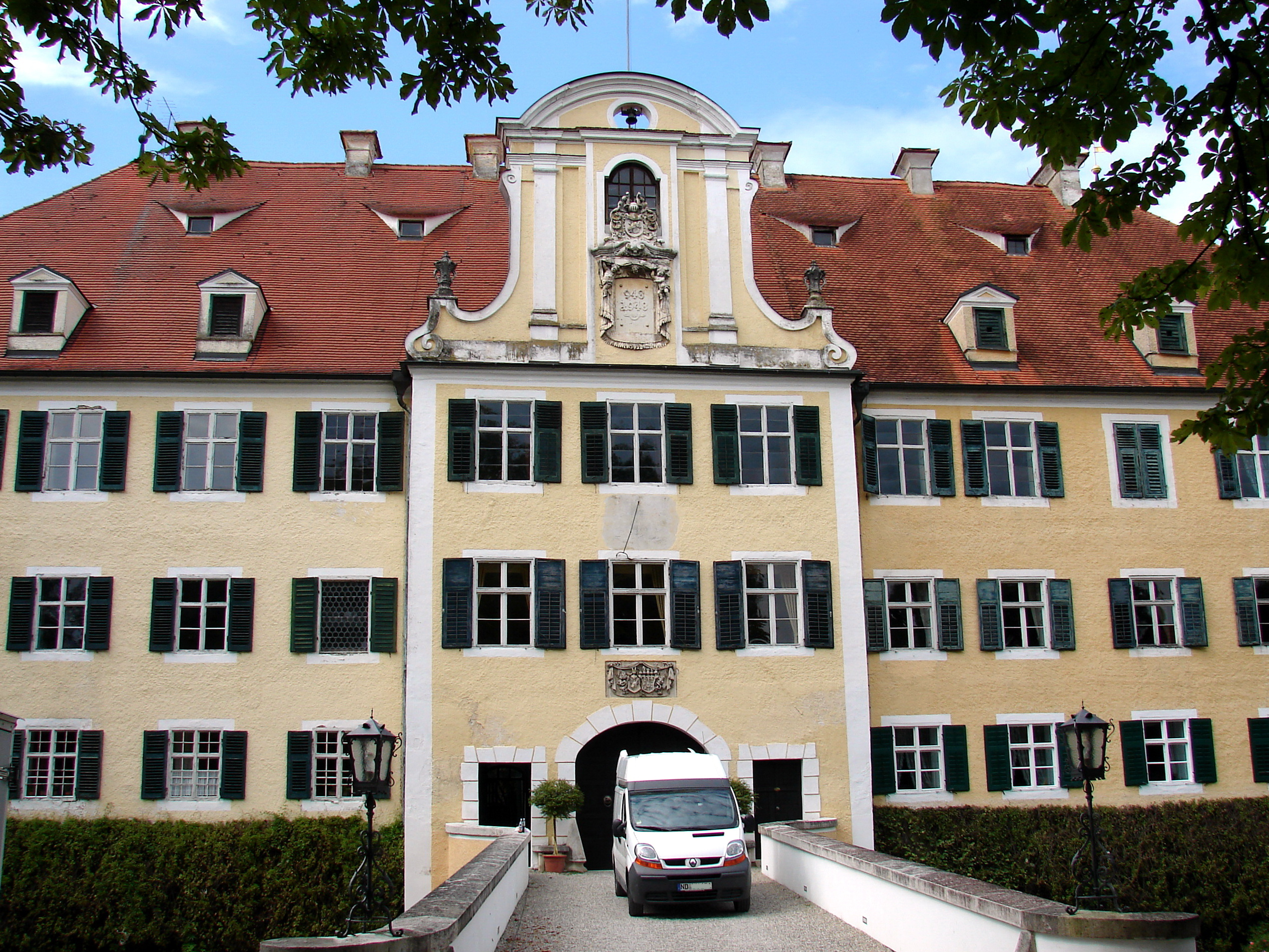 dreigeschossige Dreiflügelanlage mit breitgelagerter Fassade und übergiebeltem Mittelrisalit nach Süden und eingeschossigem Verbindungstrakt als nördliche Begrenzung des Innenhofs, nach Plänen von Johann Puchtler weitgehend neu erbaut 1749–55